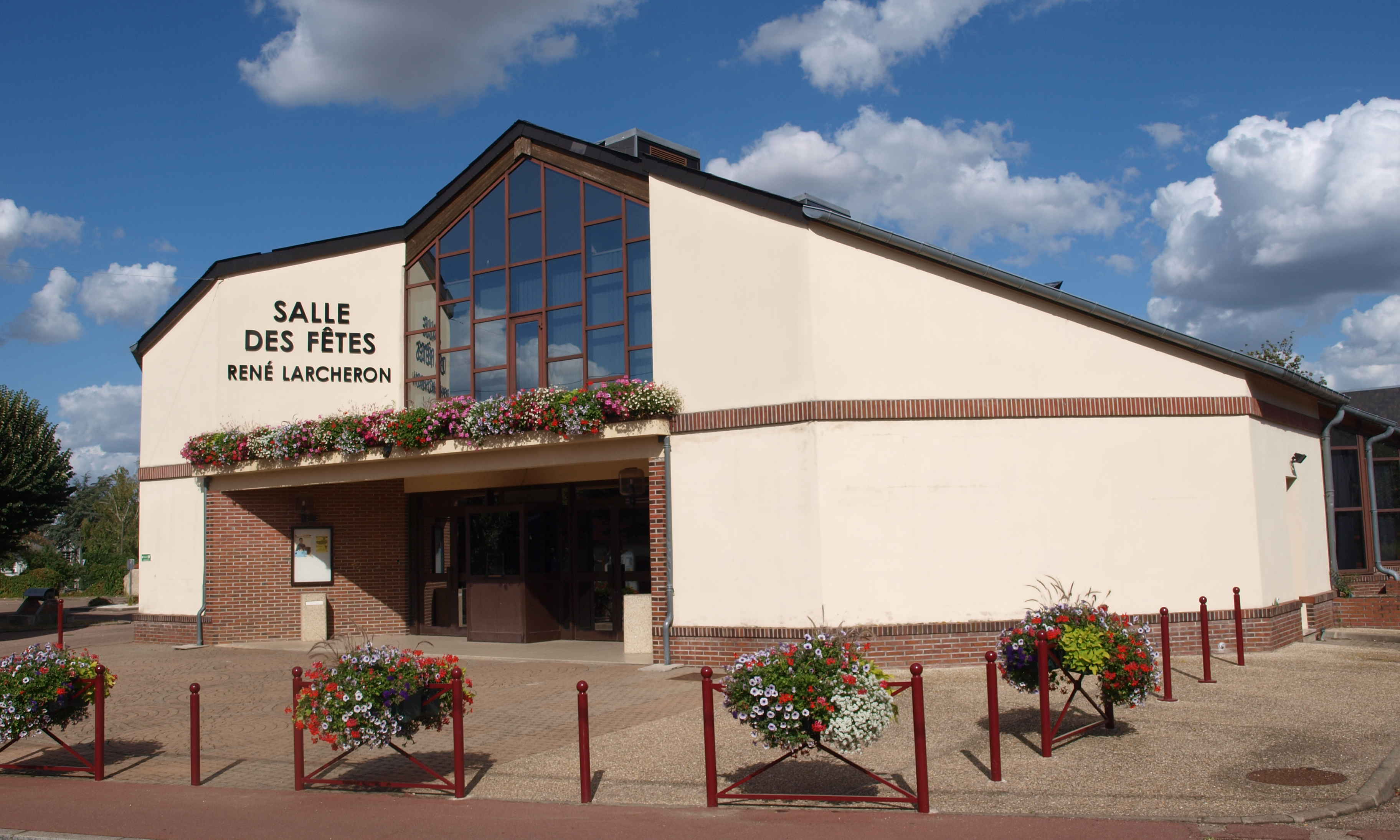 Ferrières-en-Gâtinais (Loiret, France) ; la salle des fêtes René Larcheron-02